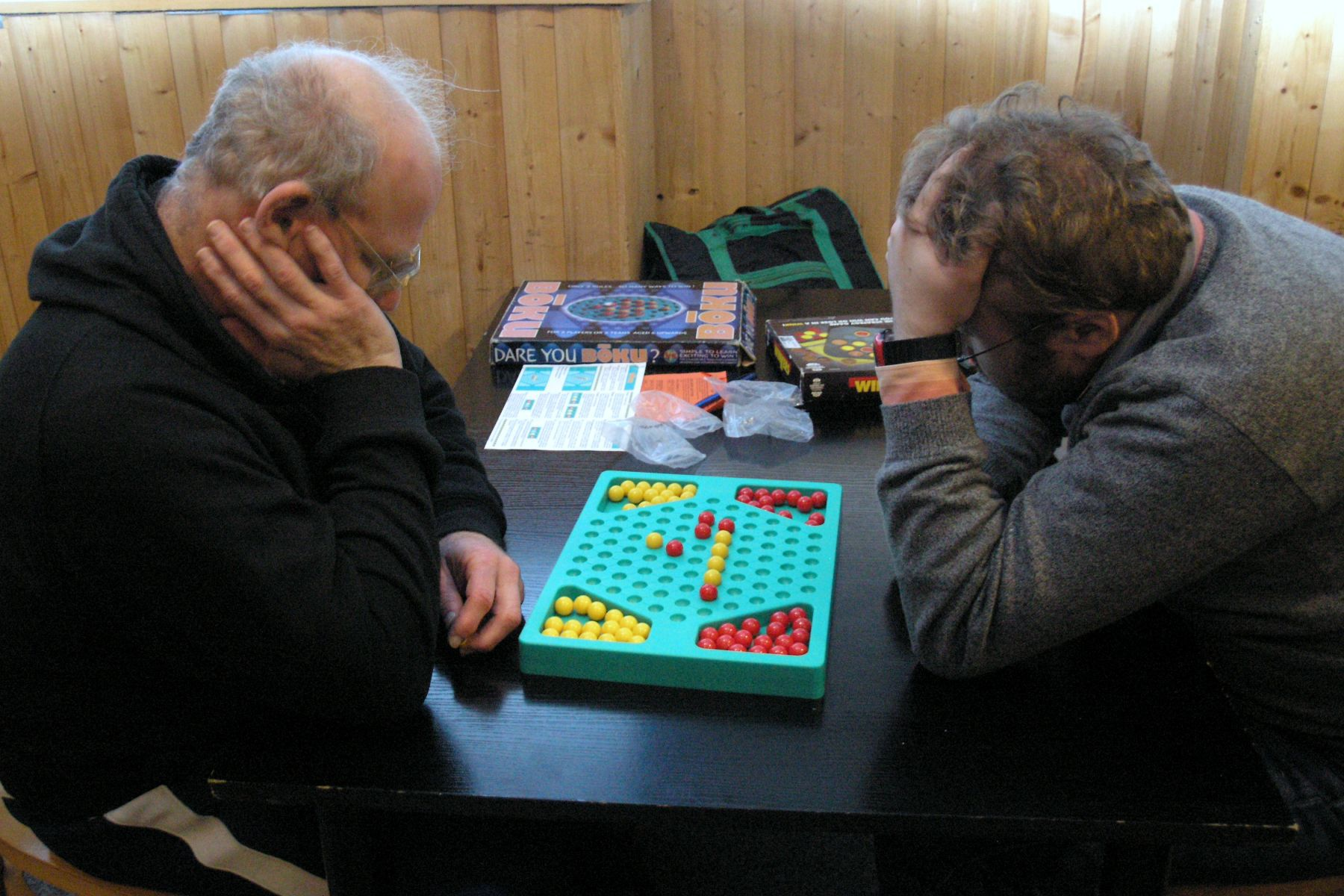 Bōku (desková hra /board game)